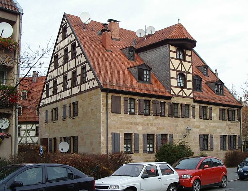 Fürth, Frau-van-Lierd-Hof mit Satelittenschüsseln von SO